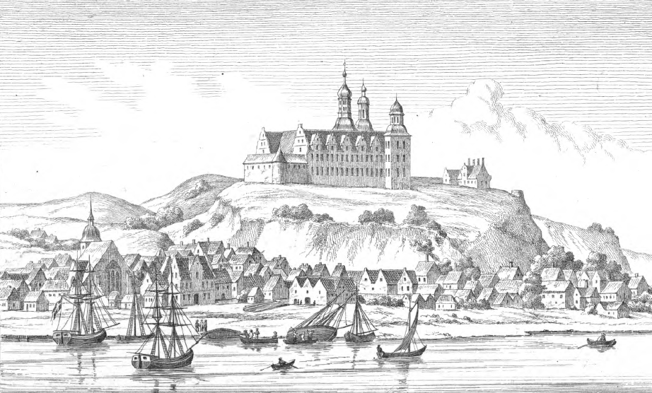 Duborg Slot omkring 1700